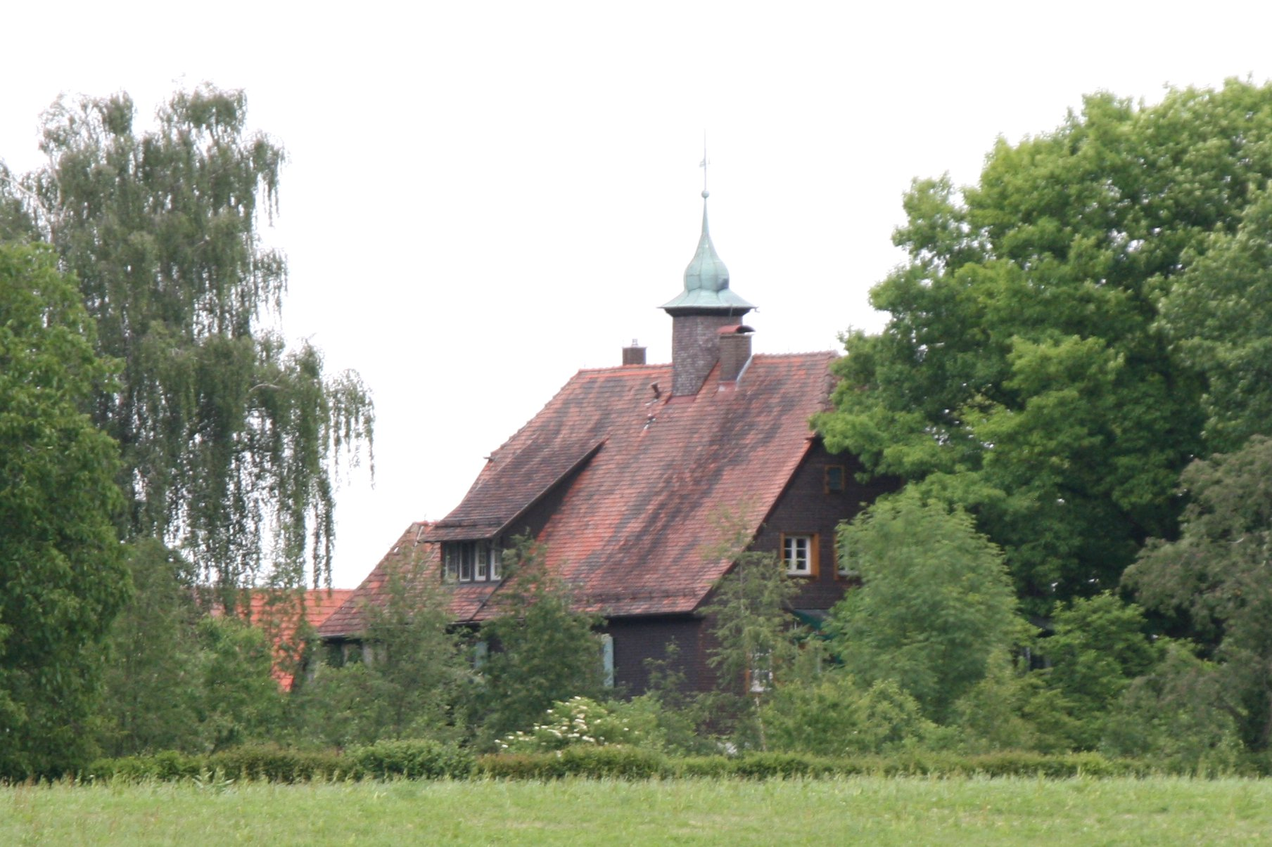 Das Jägerhaus, ehemaliges Gemmingensches Forsthaus von 1761, in Wüstenrot-Kreuzle (Bretzfelder Straße 1). Gartenseite